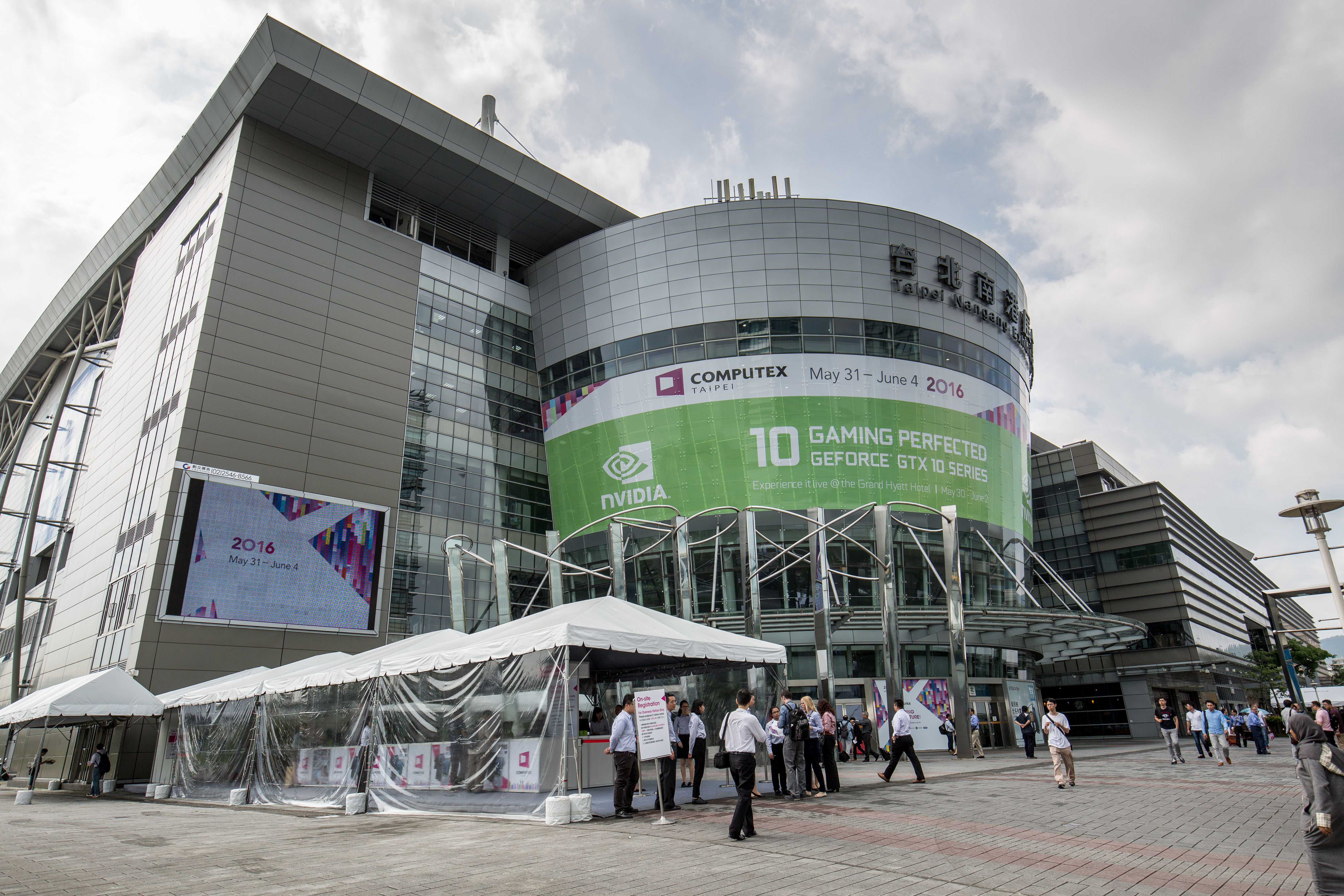 2016台北國際電腦展，台北南港展覽館展場。